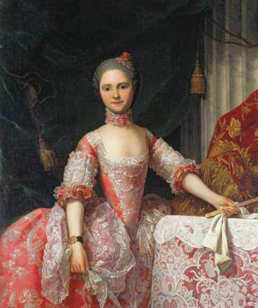 Portrait of Maria Luisa de Parma (1751-1819)